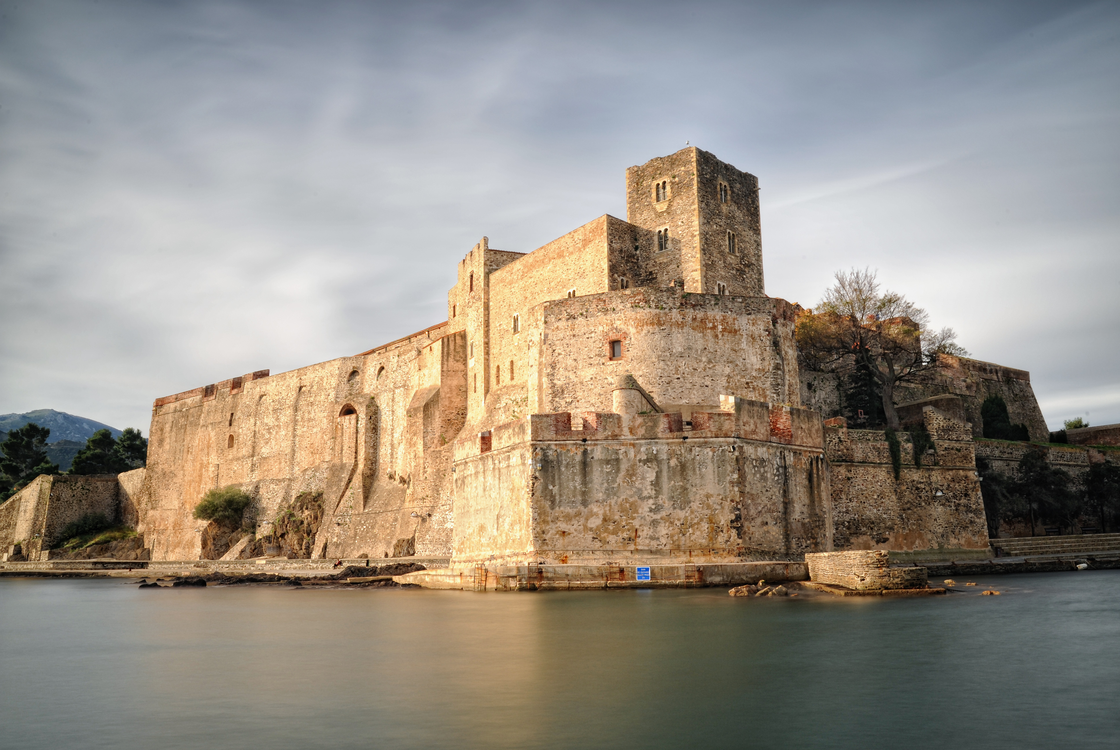 Le chateau royal de Collioure